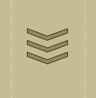 ՀՀ ԶՈՒ սերժանտ զինվորական կոչում